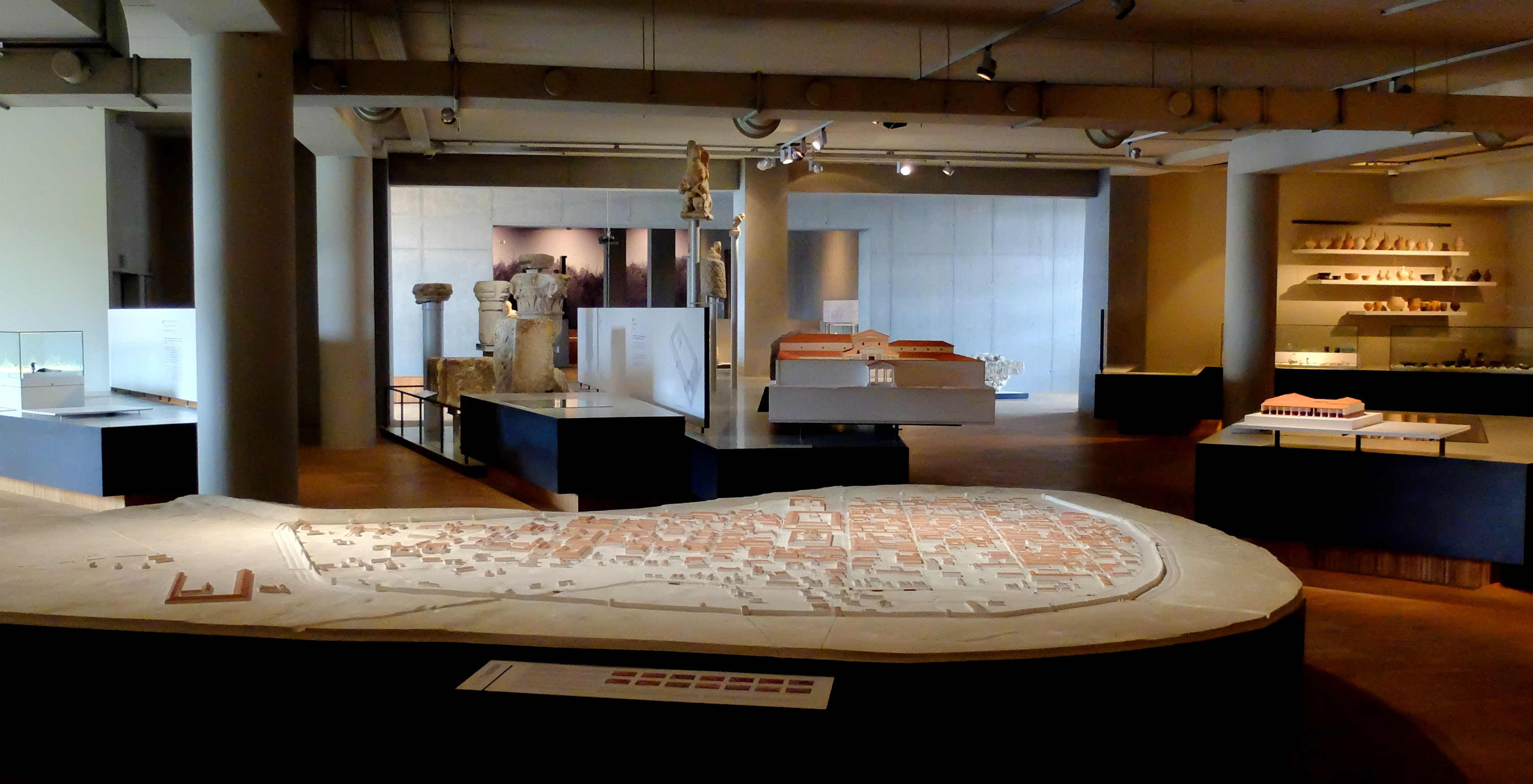 Gallisch-Römisches Museum Tongern.